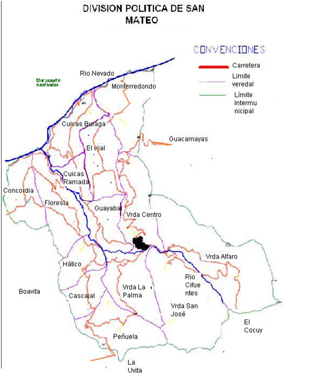 croquis municipio de san mateo boyaca- colombia